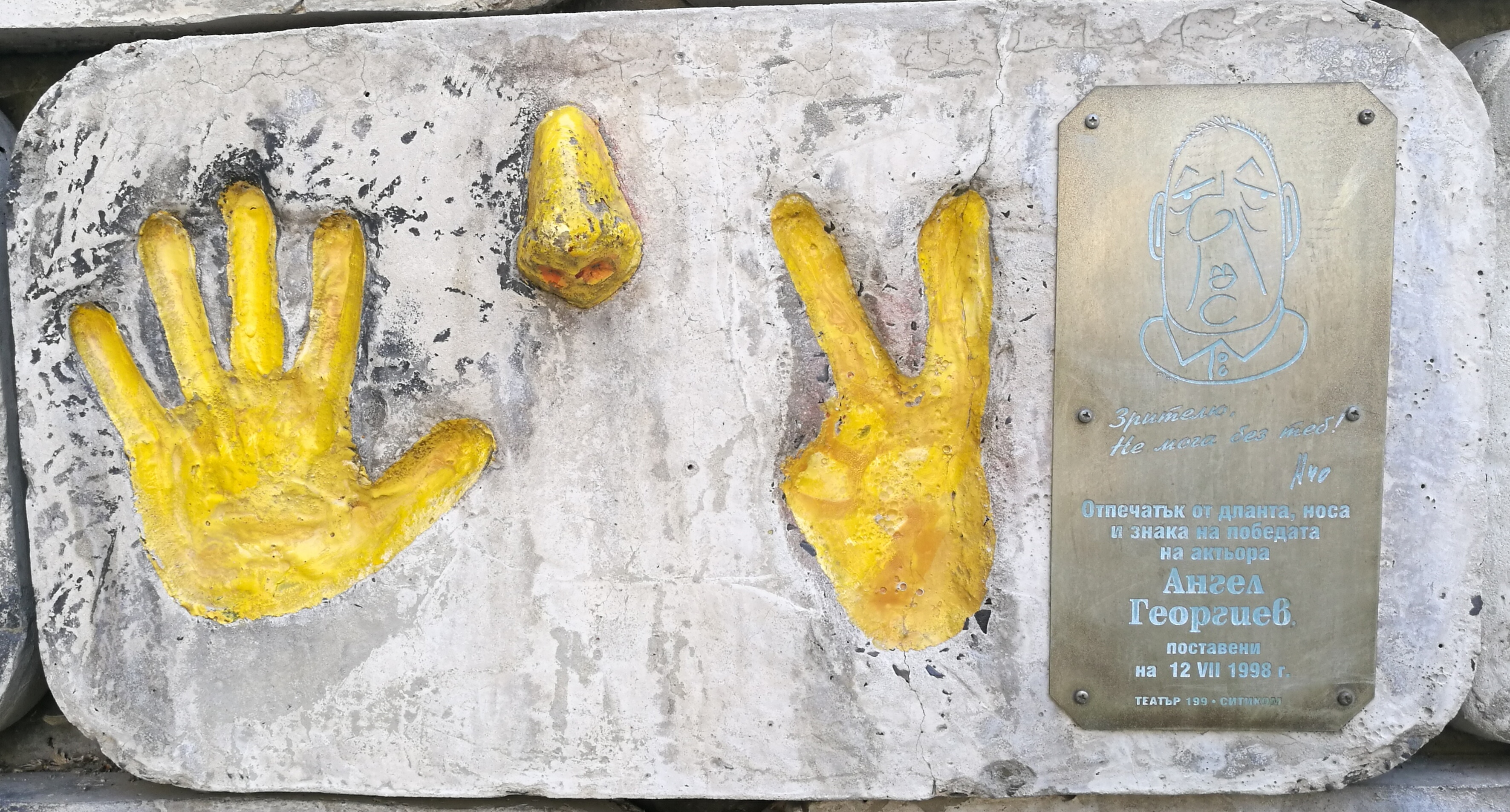 Стената на славата пред Театър 199 - пано с отпечатъци, послание и шарж на Ангел Георгиев - Ачо.